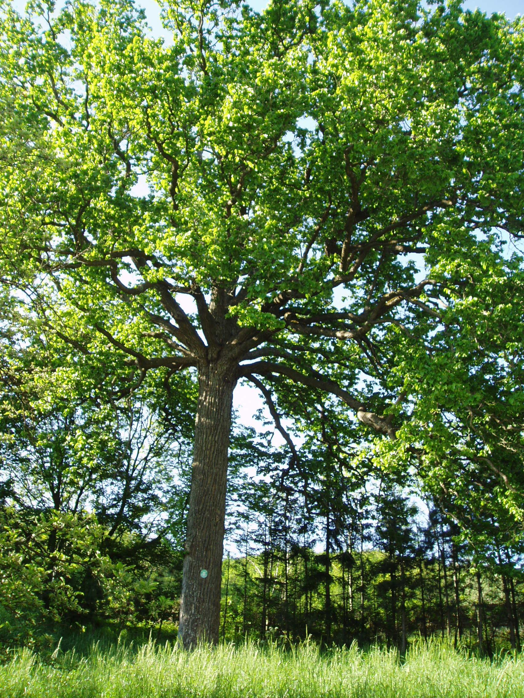 Türkenhasel, 450 Jahre altes Naturdenkmal, das an die erste Wiener Türkenbelagerung erinnert, es steht in Alland This media shows the natural monument in Lower Austria with the ID BN-005.